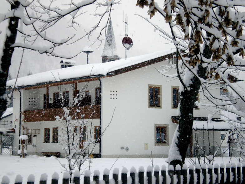 früheres Forsthaus im Dorf Fall, jetzt Stiftungshaus der Stiftung der Deutschen Polizeigewerkschaft